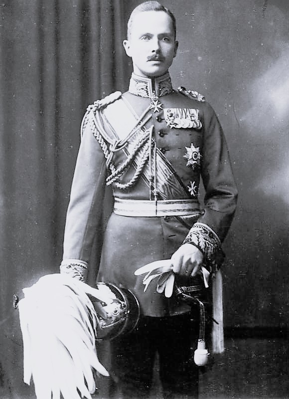 ADN-ZB/Archiv Karl Eduard Herzog von Sachsen-Koburg-Gotha. Abgebildete Personen: Sachsen-Coburg und Gotha, Karl-Eduard von: 1884-1954, Herzog, Präsident des Deutschen Roten Kreuzes, Deutschland